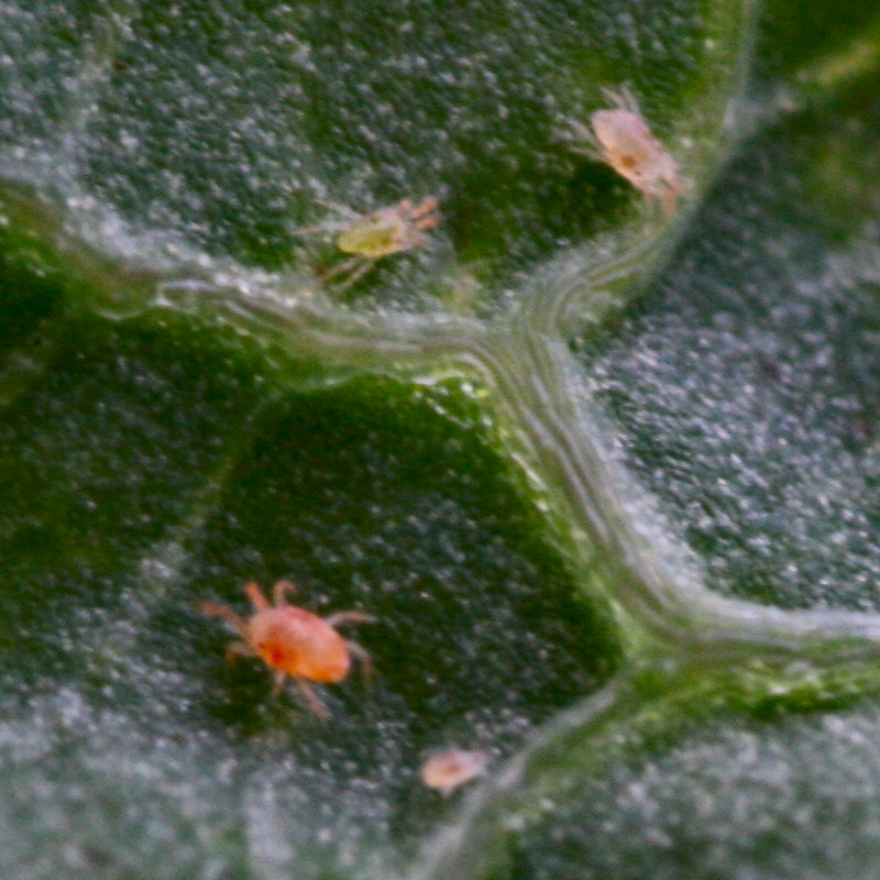 Beschreibung: Spinnmilben Quelle: selbst fotografiert Datum: August 2006 Fotograf: Karsten Dörre (grizurgbg)